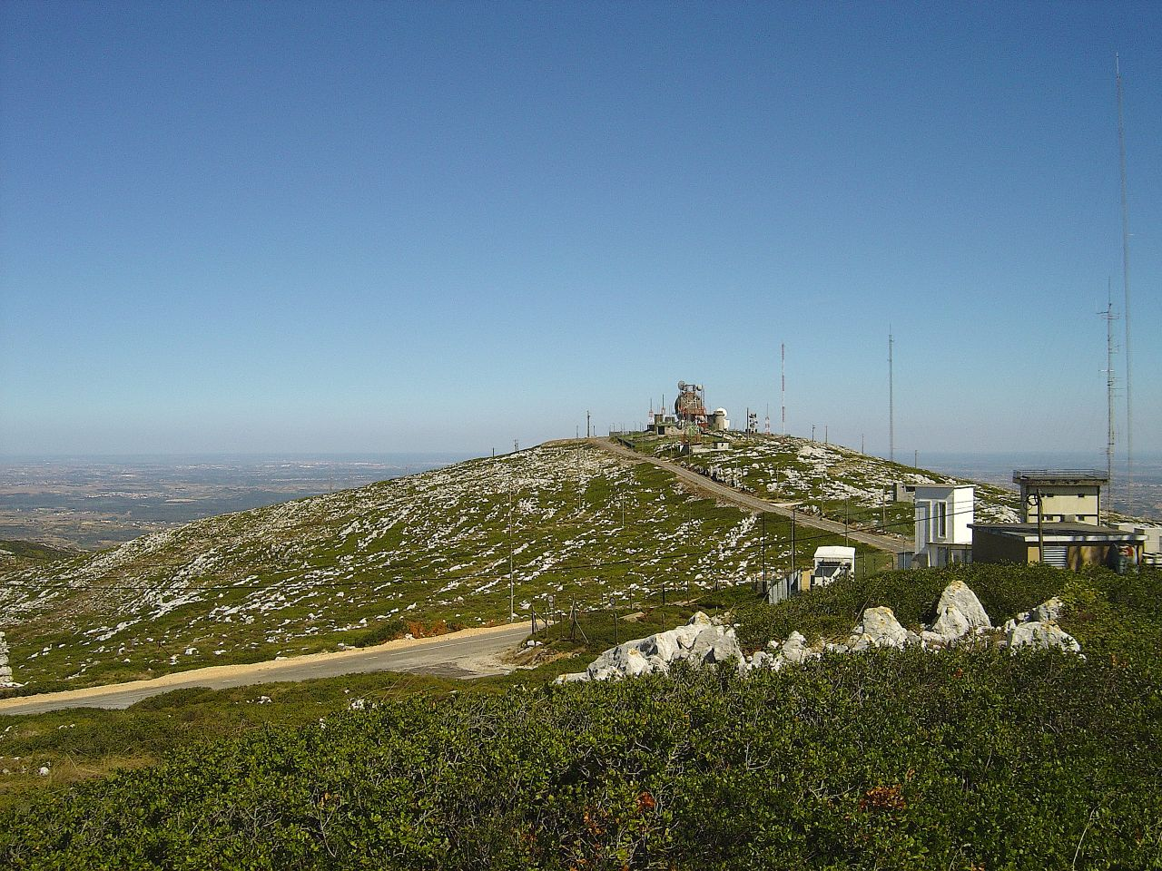 Serra de Montejunto - Portugal